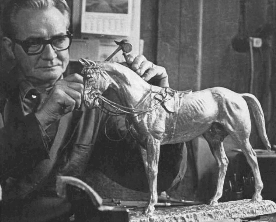 "Den gyllene hästen" skulpterad av Märta Améen var Otto Meyers konstgjuteriets sista gjutning